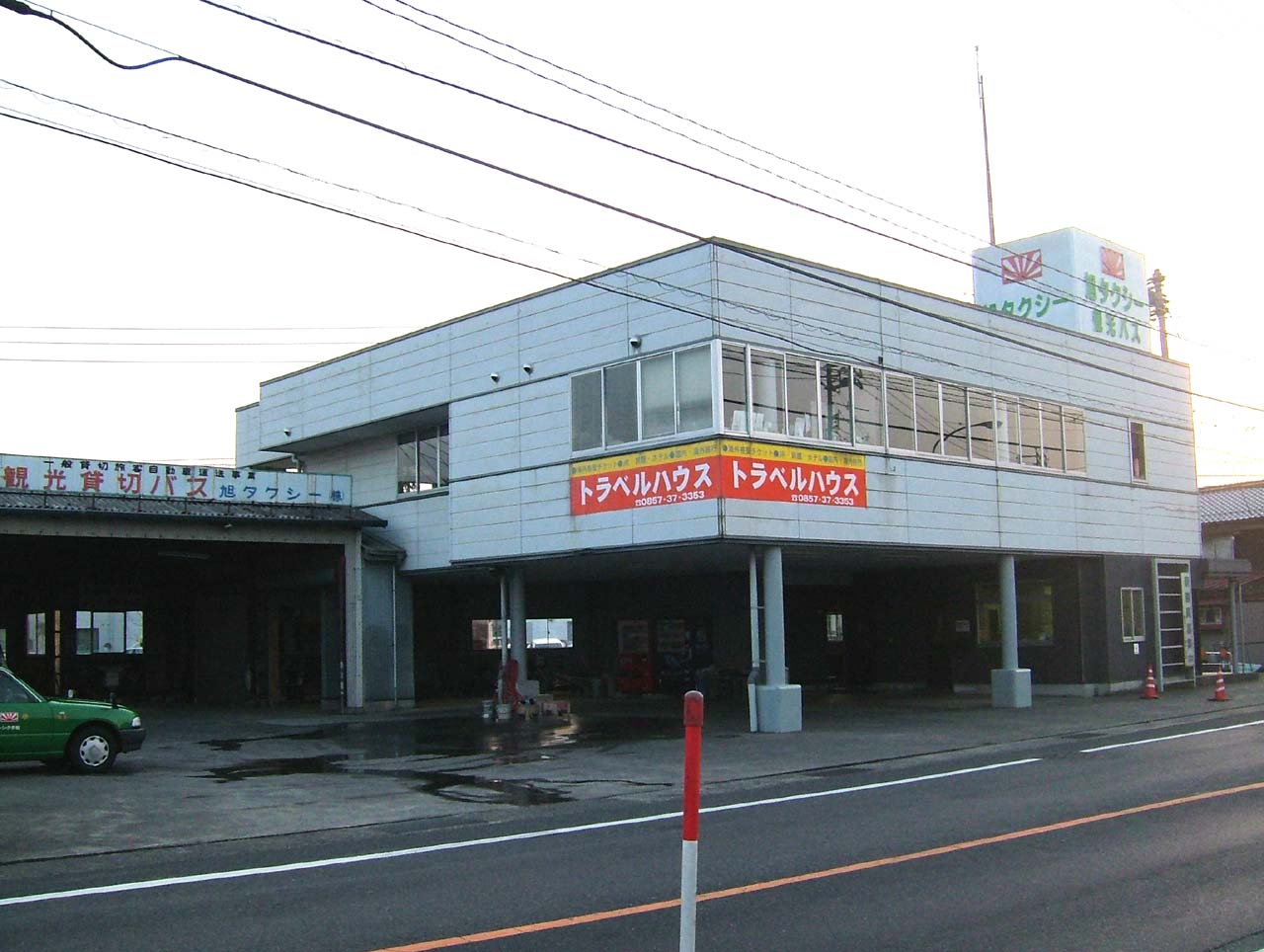 旭タクシー (鳥取県)